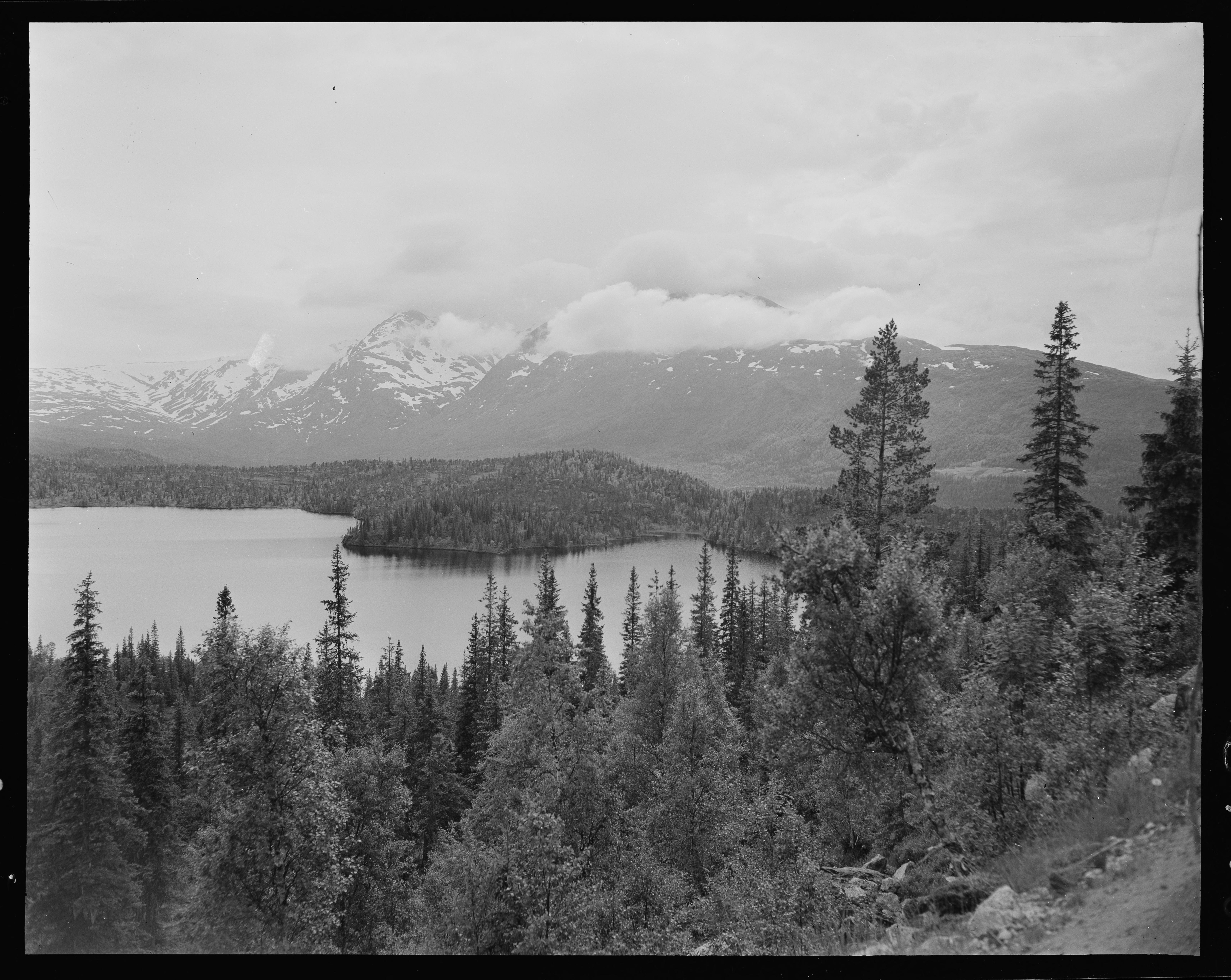 Bildet er hentet fra Nasjonalbibliotekets bildesamling. Anmerkninger til bildet var: Fotograf : ukjent Luktvatnet,Osen, Vefsn, Nordland